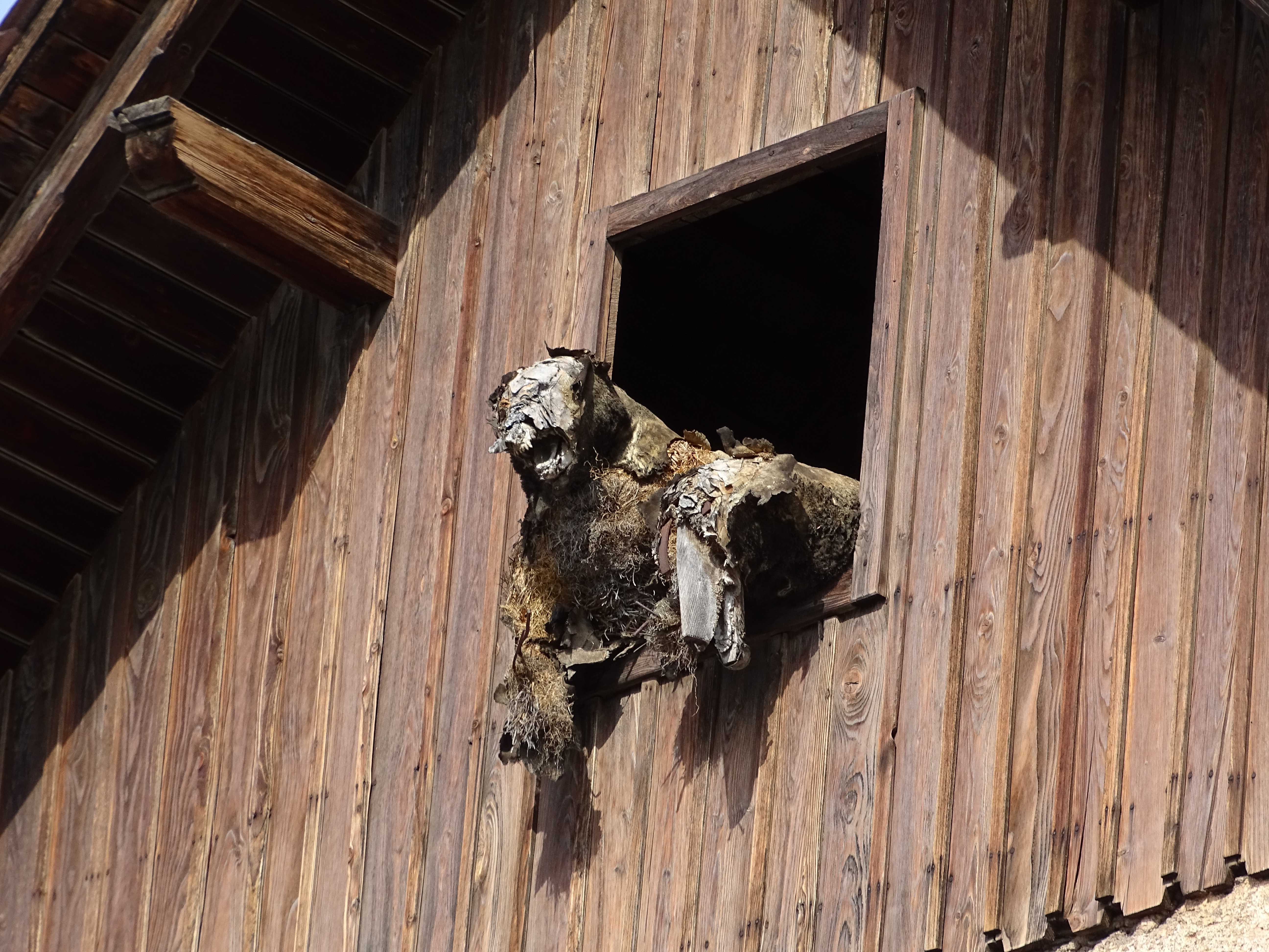 Der Bär der aus einem Fenster des Buchhauses in Geistthal in der Gemeinde Geistthal-Södingberg schaut